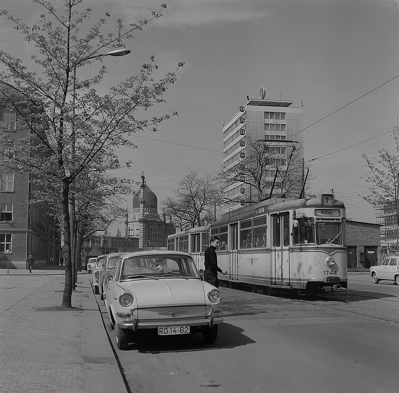 Original image description from the Deutsche FotothekDresden. Blick entlang der Julian-Grimmau-Allee auf das Haus der Presse und die Tabakfabrik im Hintergrund